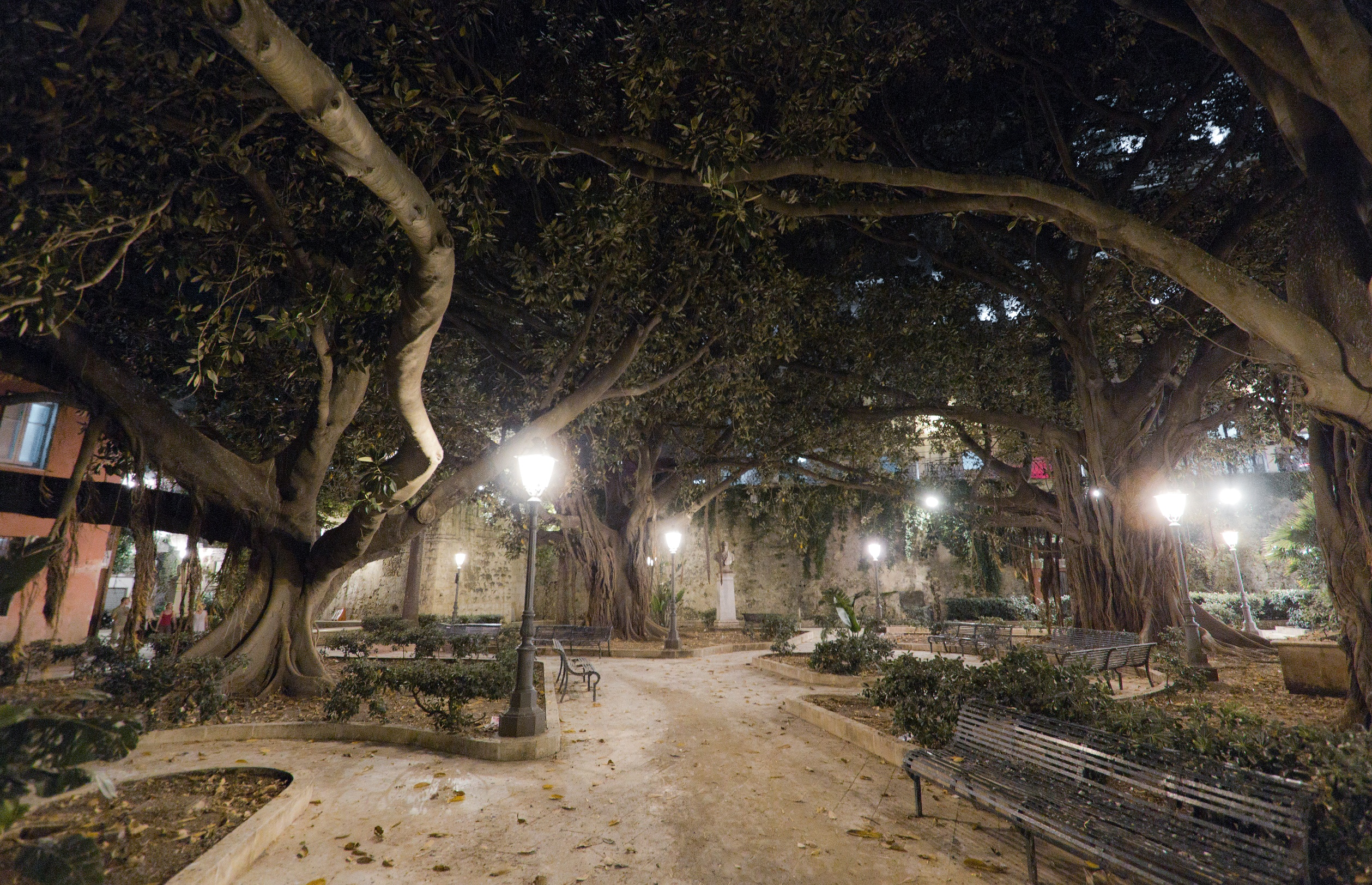 Alberi Marina di Ortigia